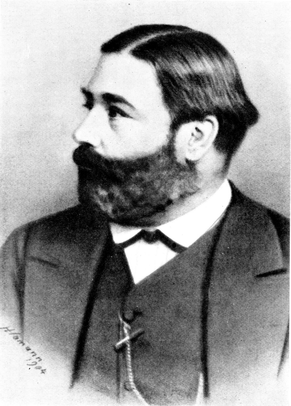 Bild des Bankiers Ferdinand Schlachter, der ersten Präsidenten der Handelskammer des Saarlandes. Das Bild ist abgedruckt in: Fritz Hellwig: Die Saarwirtschaft und ihre Organisationen : seit der Errichtung der Industrie- und Handelskammer zu Saarbrücken 1863/64 ; im Auftrag der Kammer anläßlich ihres 75jährigen Bestehens, 1939